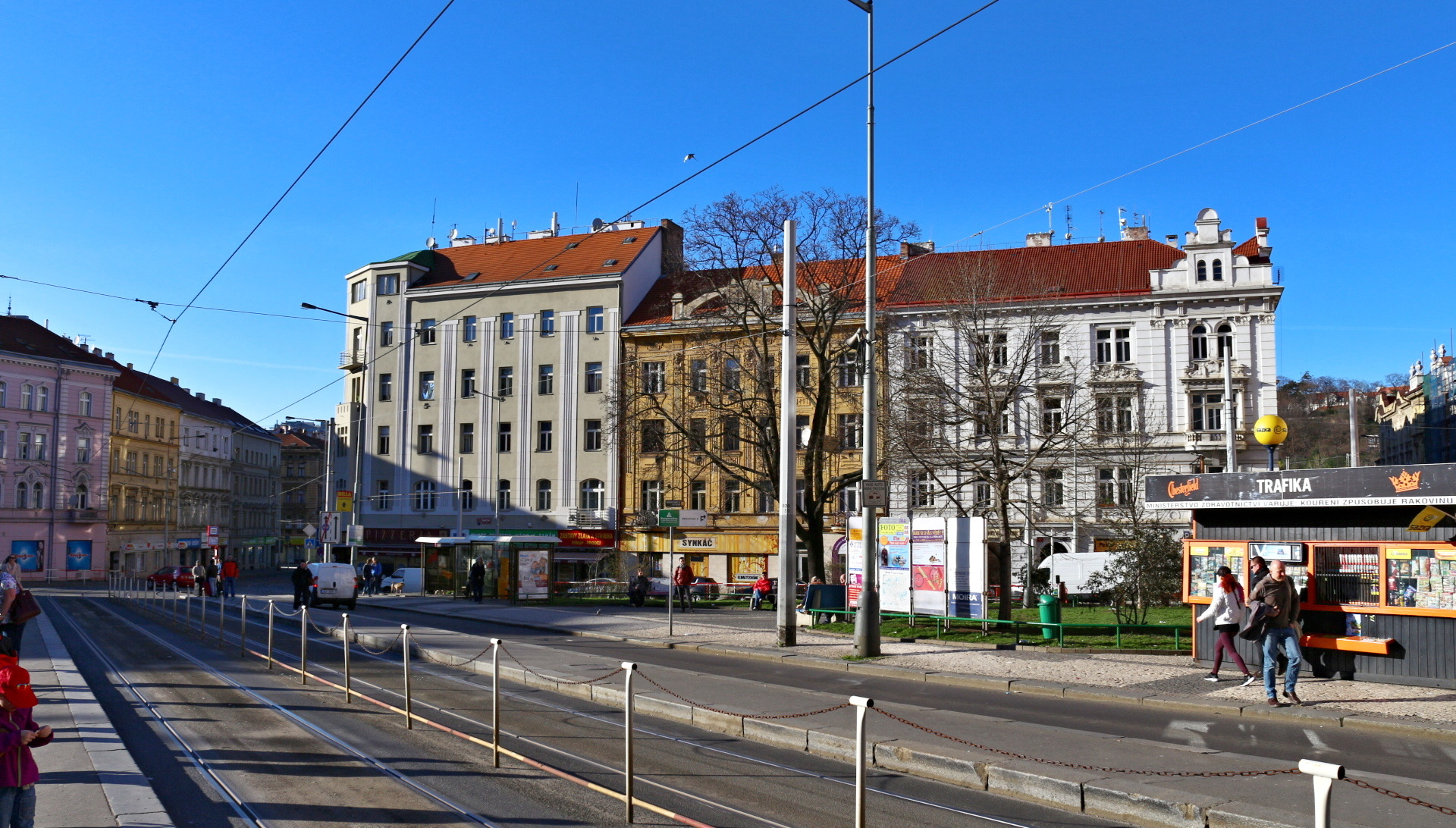 Náměstí Bratří Synků